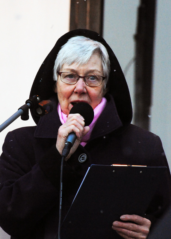 Madeleine Leijonhufvud